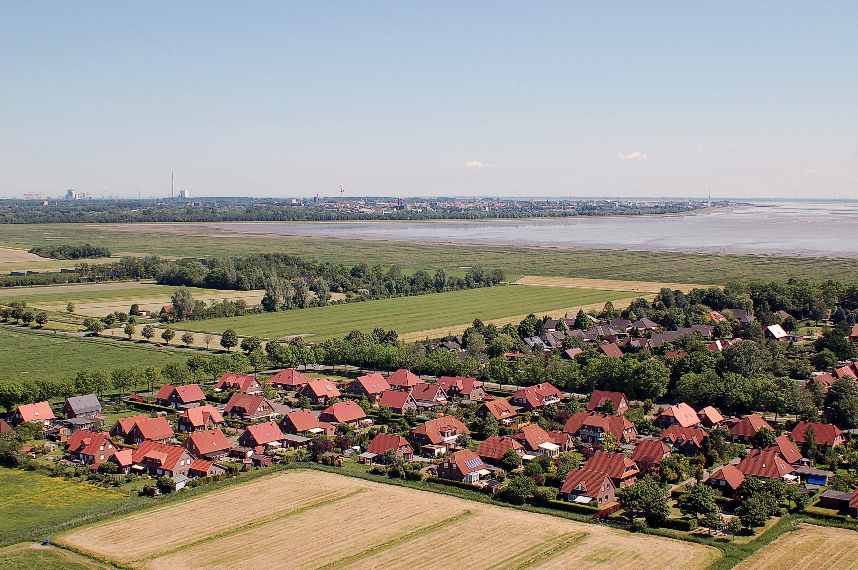 Luftbilder von der Nordseeküste 2012-05